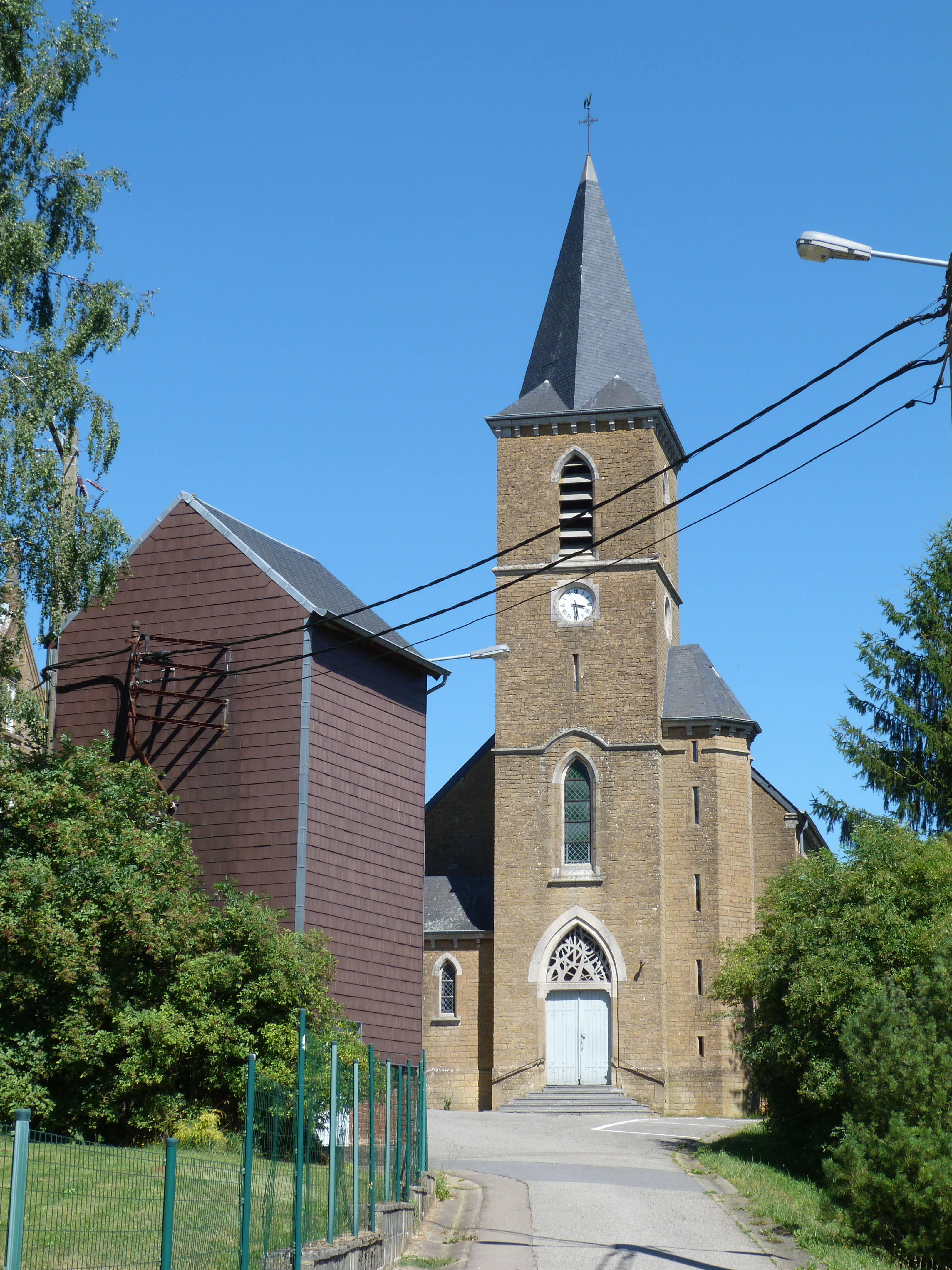 L'église de Baranzy en août 2013